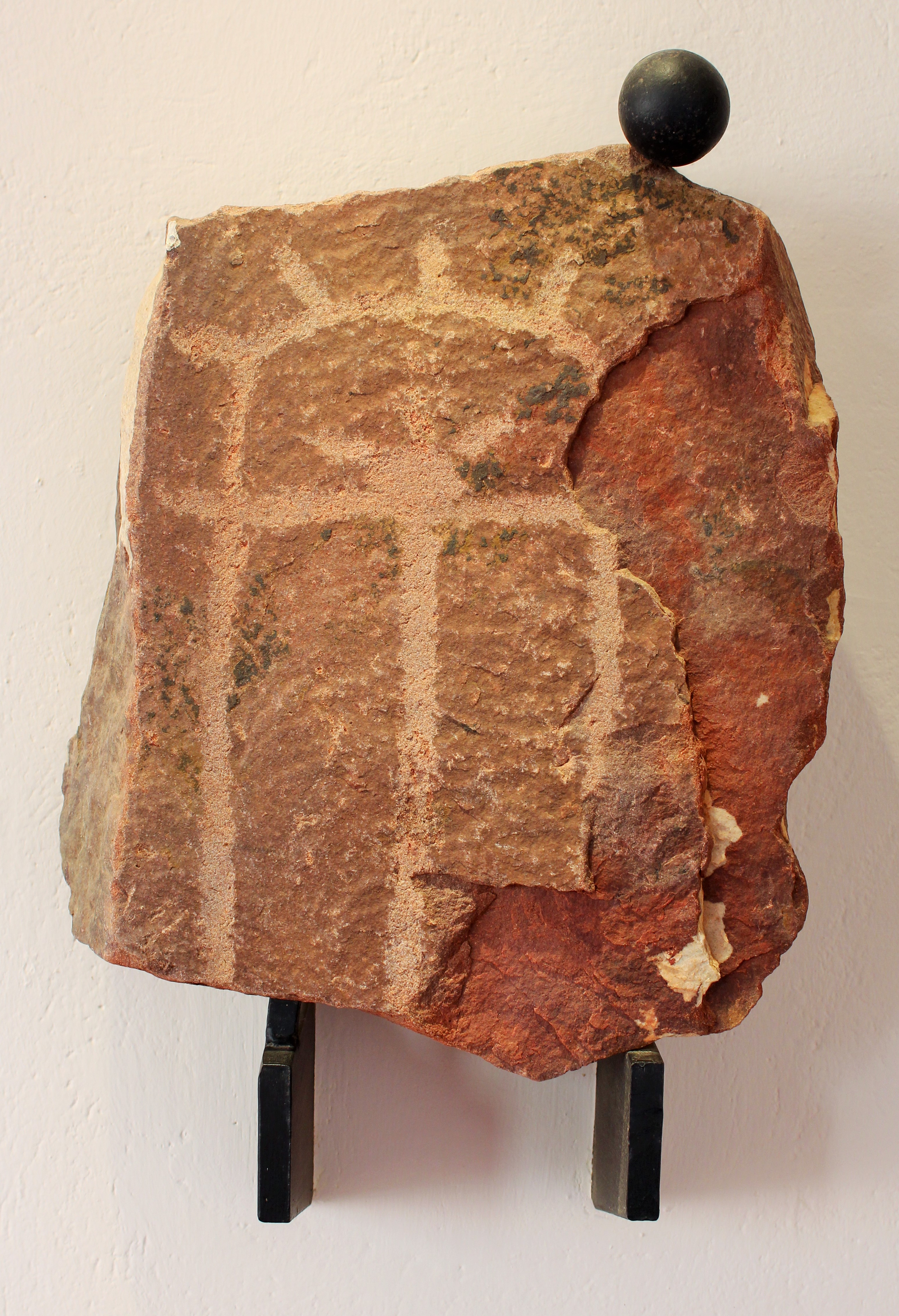 Estela de guerrero. Siglo VII-VI a.C Los Llanos, Zarza Capilla, Badajoz-II